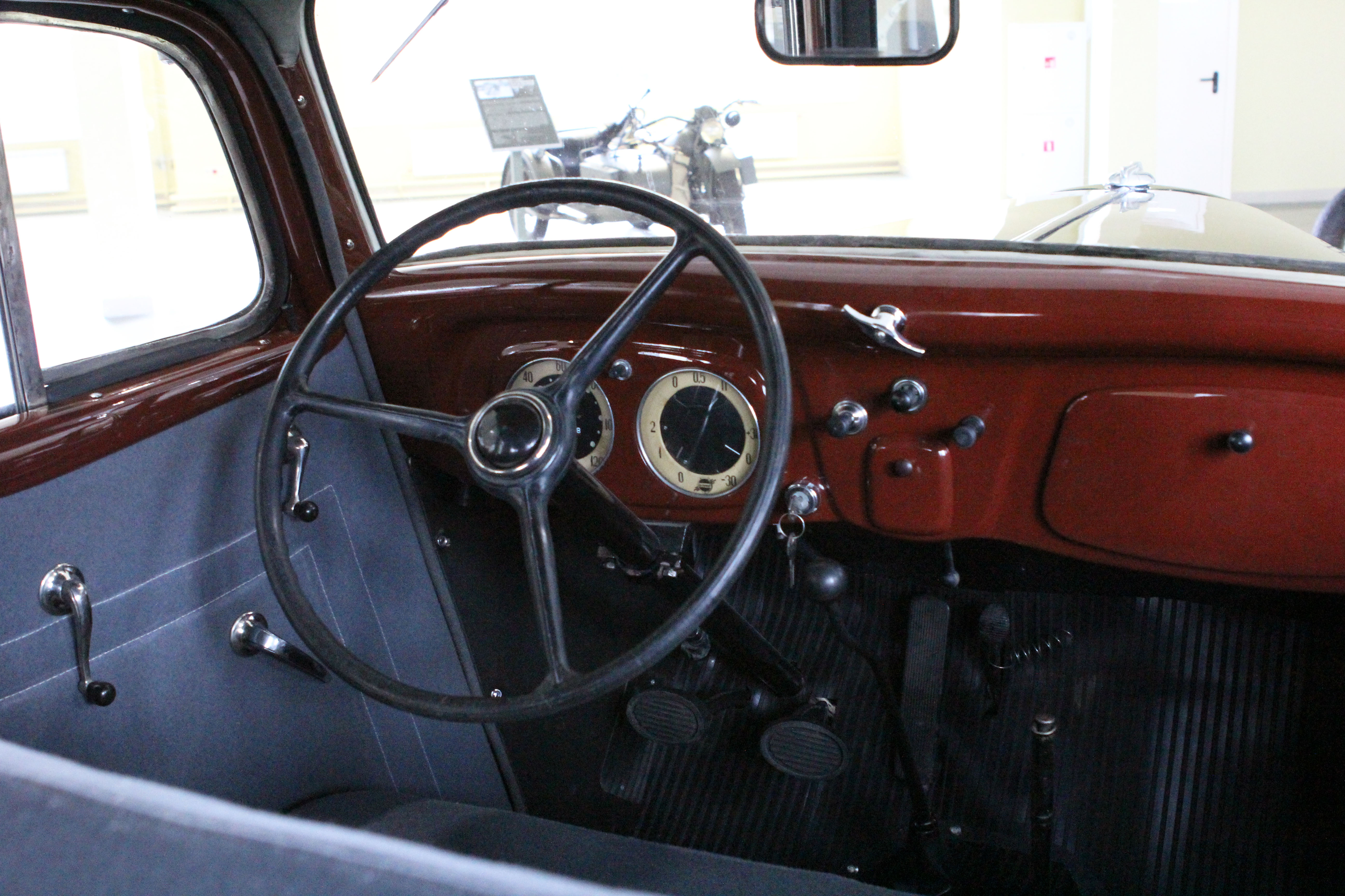 Отреставрированный салон автомобиля ГАЗ-М-1